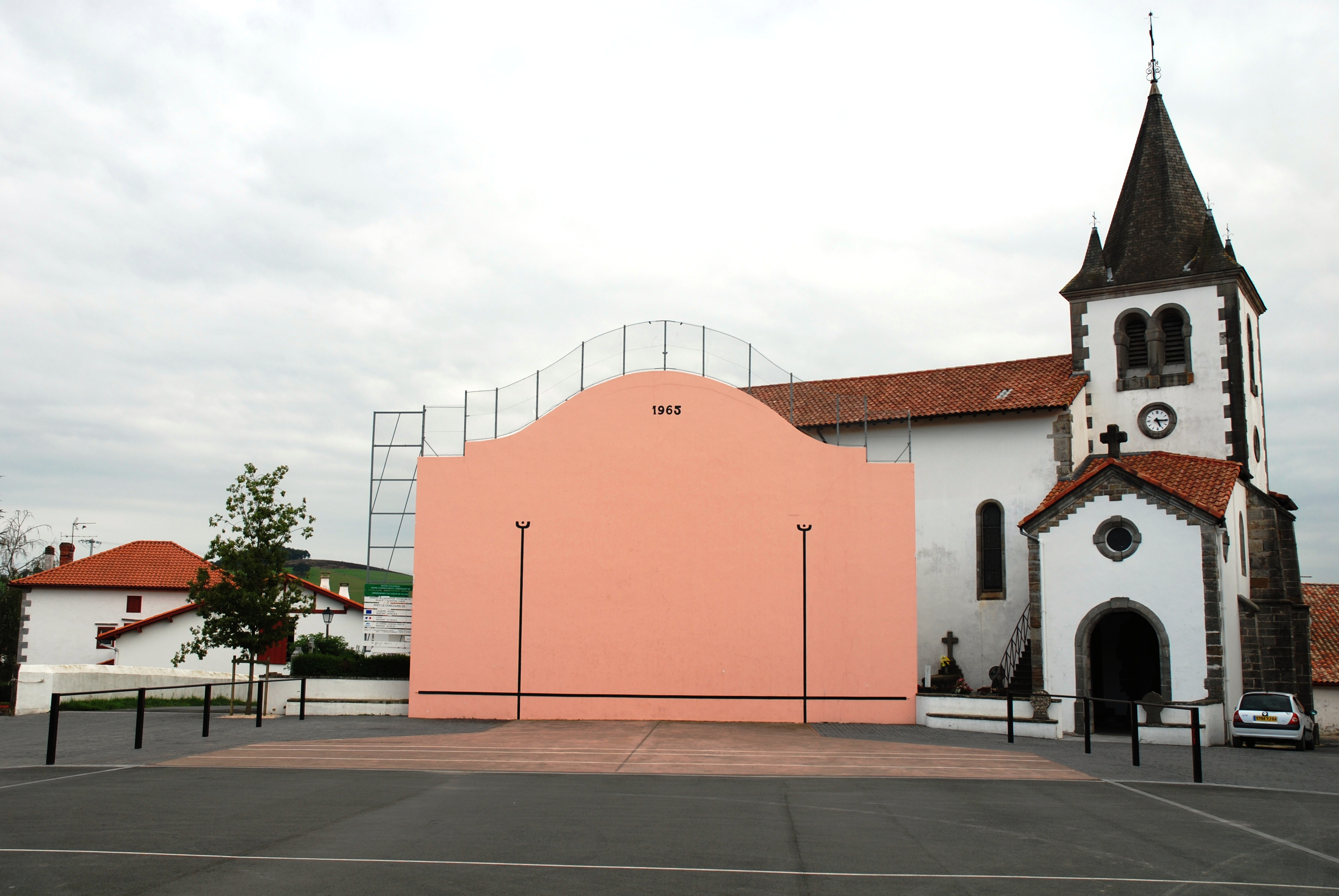 Armendarits, le fronton place libre adossé à l'église Sainte-Marie